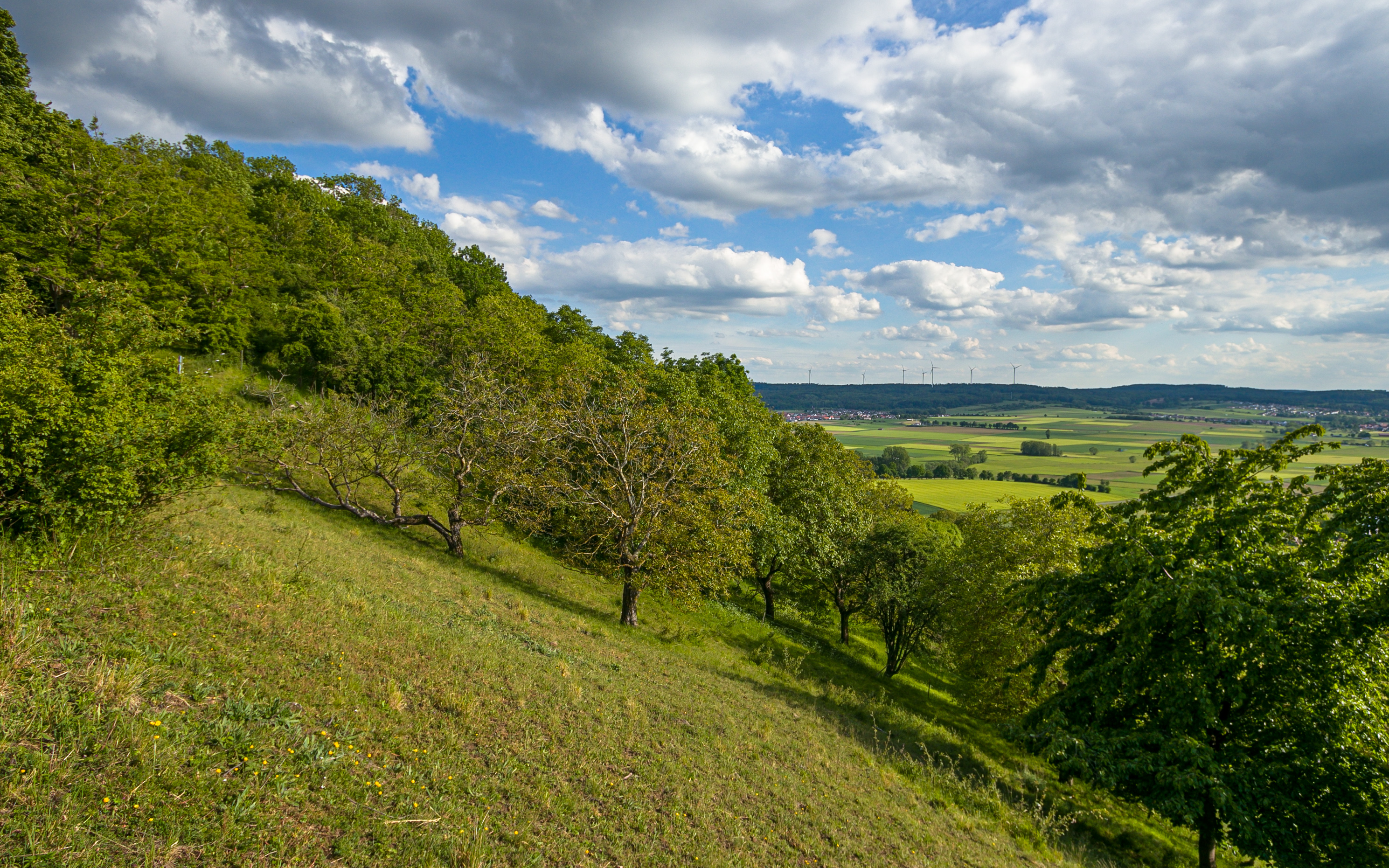 Amöneburg, Westhang: Blick auf Südhügel